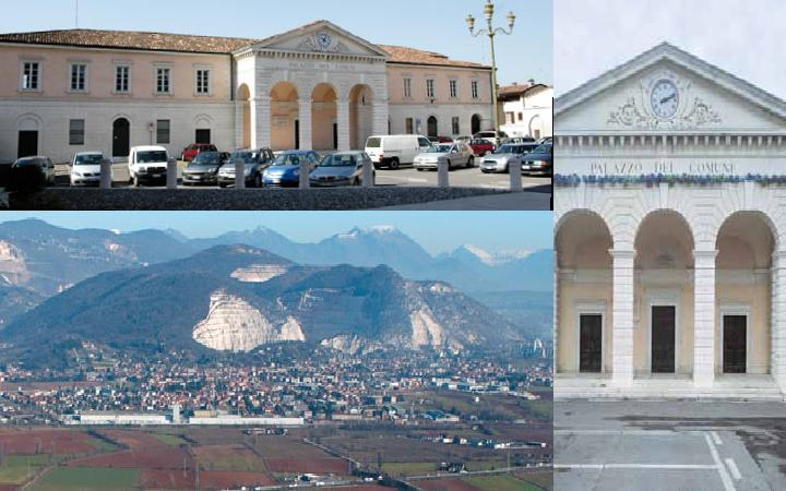 Fotogrammi uniti di Rezzato